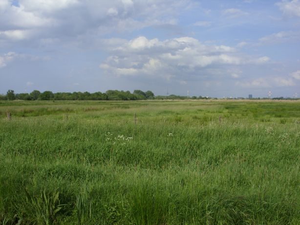 Ochtumniederung bei Brokhuchting